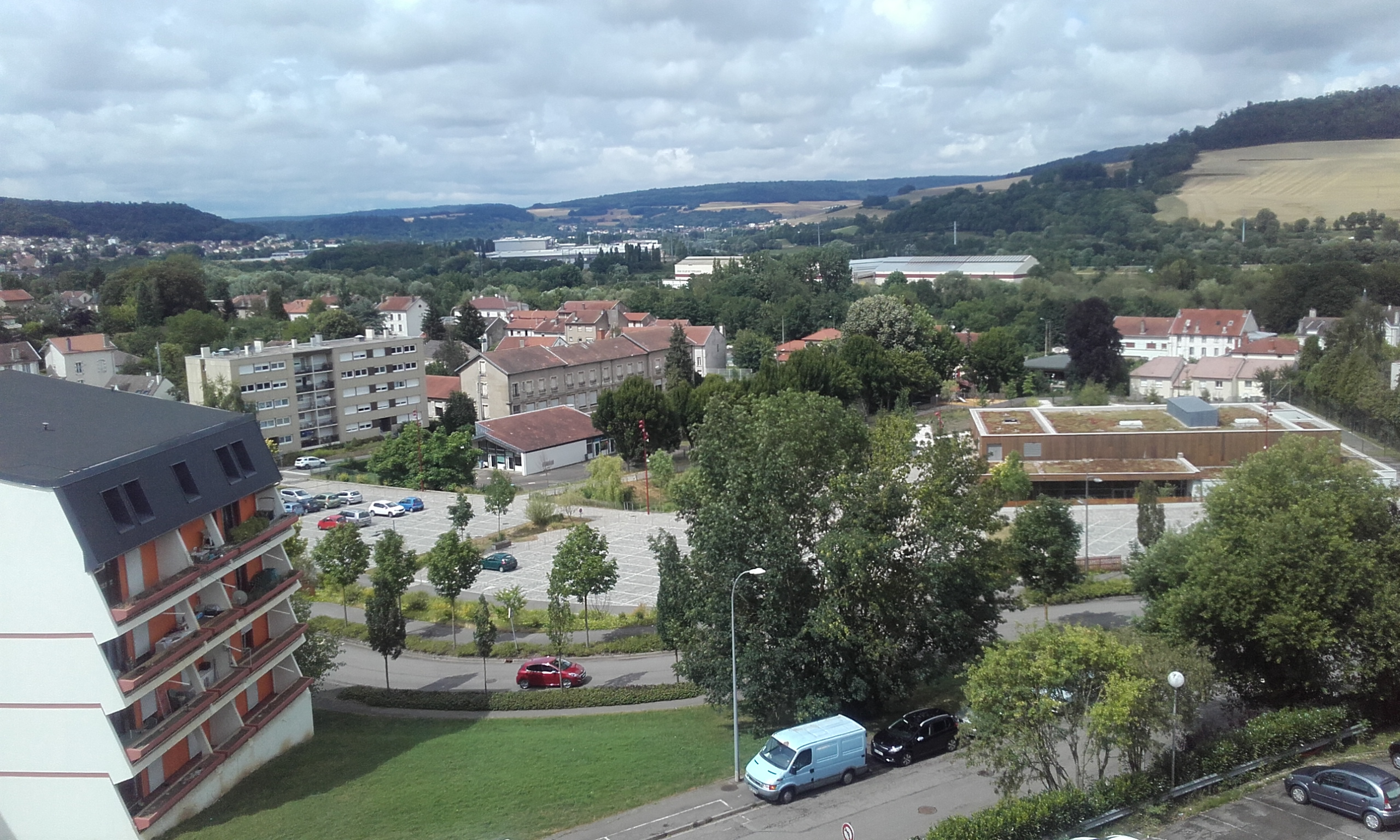 L Ermitage